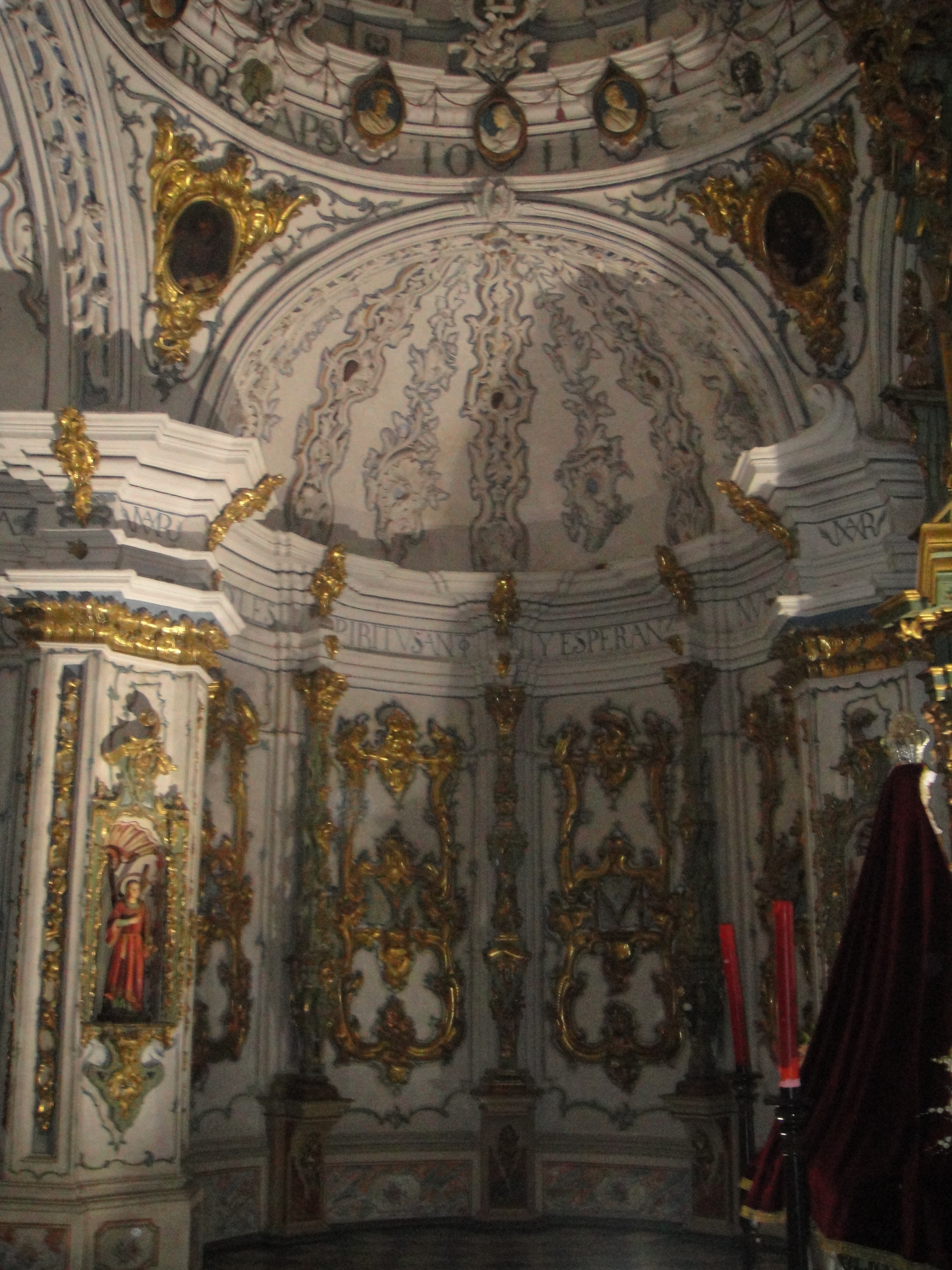 Interior del camarín de la iglesia de San Francisco de Fuente Obejuna, provincia de Córdoba, (España).